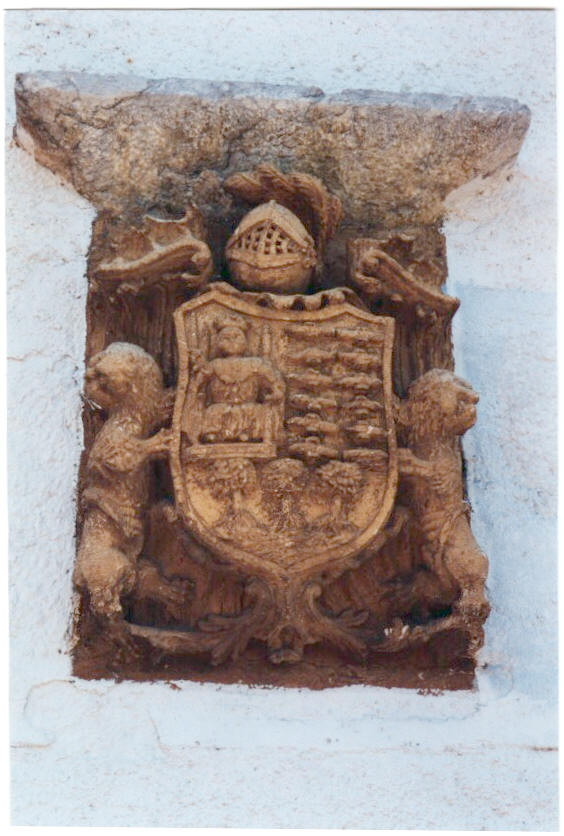 Armas de los Saralegui